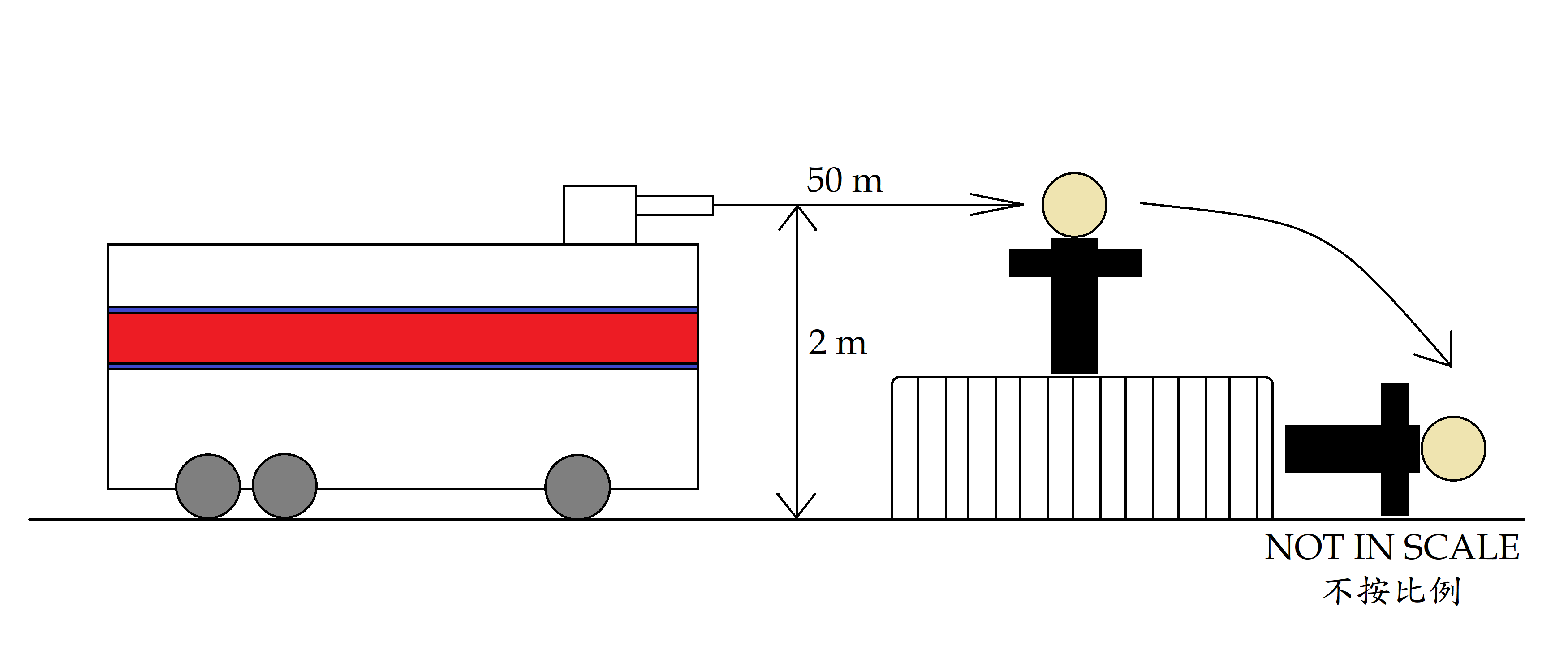 中文（香港）: 人群管理特別用途車（水炮車）威力示意圖。